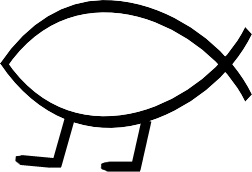 Picture of a Darwin fish Taken from Image:Ichthus.png and modified by User:Raul654 (İngilizce Vikipedi'den)